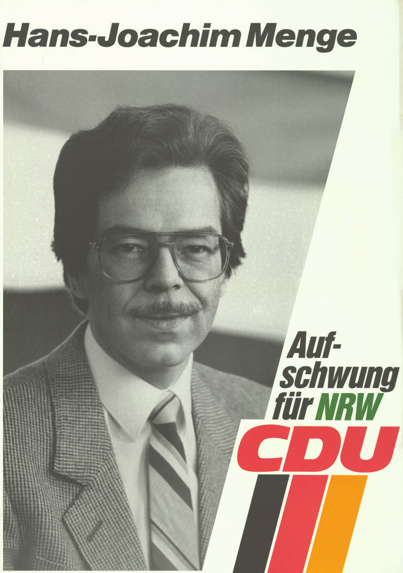 Hans-Joachim Menge Auf- schwung für NRW CDU Abbildung: Porträtfoto Plakatart: Kandidaten-/Personenplakat mit Porträt Objekt-Signatur: 10-009 : 934 Bestand: Landtagswahlplakate Nordrhein-Westfalen (10-009) GliederungBestand10-18: Landtagswahlplakate Nordrhein-Westfalen (10-009) » CDU Lizenz: KAS/ACDP 10-009 : 934 CC-BY-SA 3.0 DE